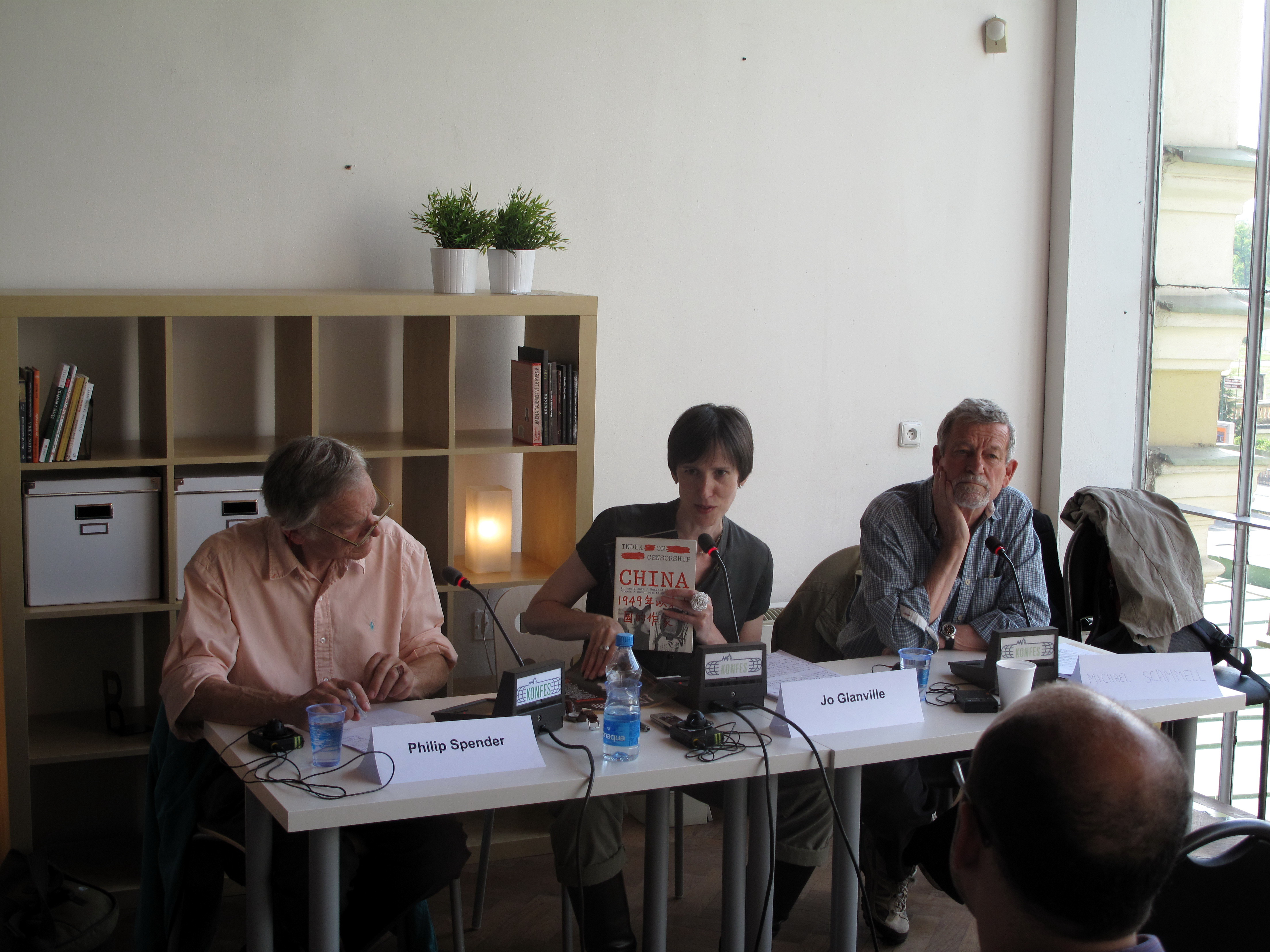 Svět knihy 2011, představitelé časopisu Index on Censorship Philip Spender, Jo Glanville, Michael Scammell